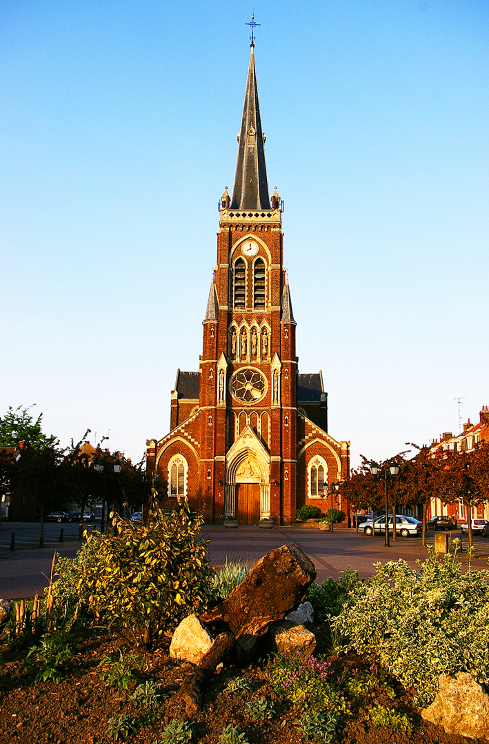 Eglise de Saint-André-Lez-Lille